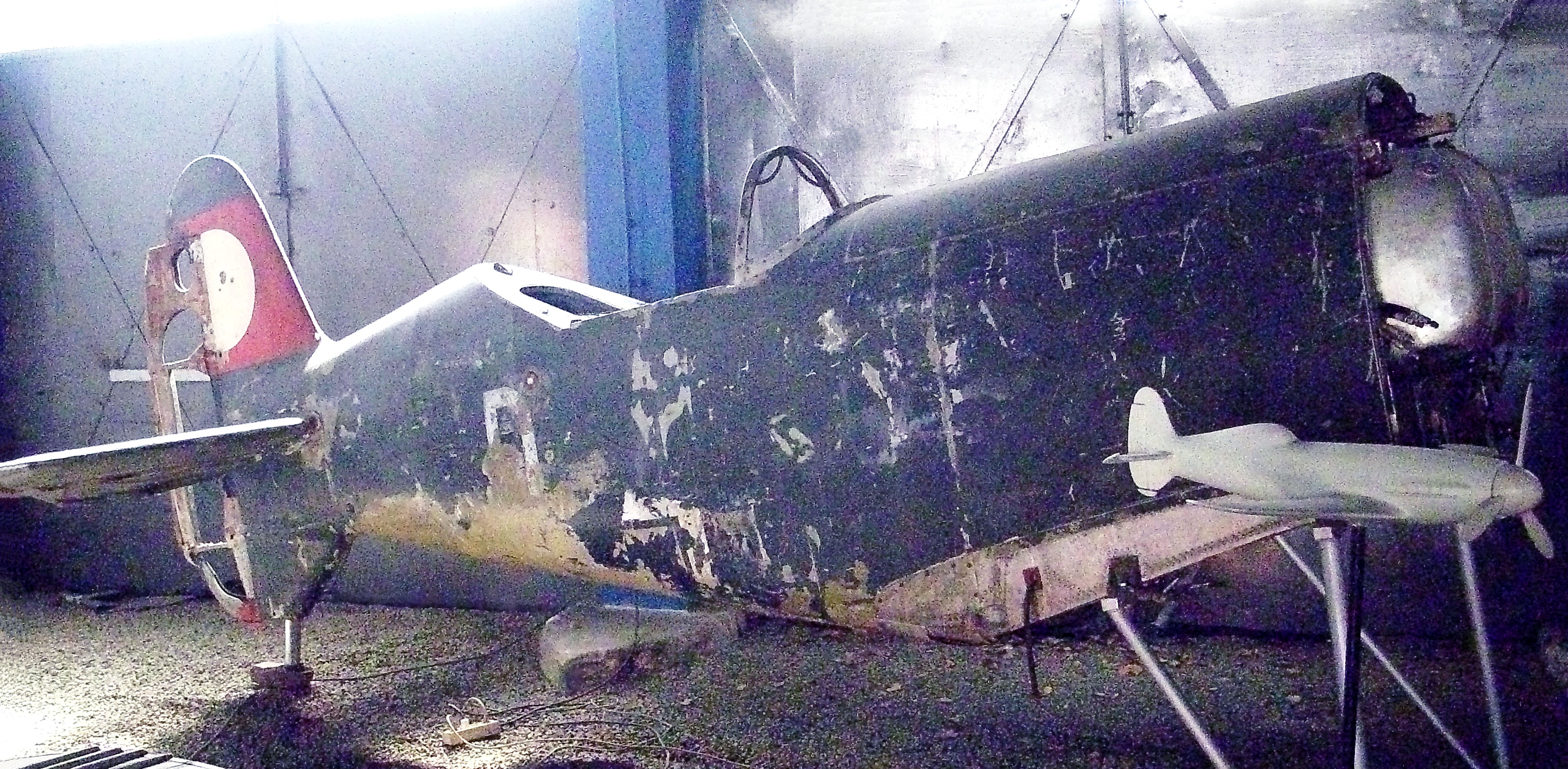 Me 209 Krakau 2010-04-24